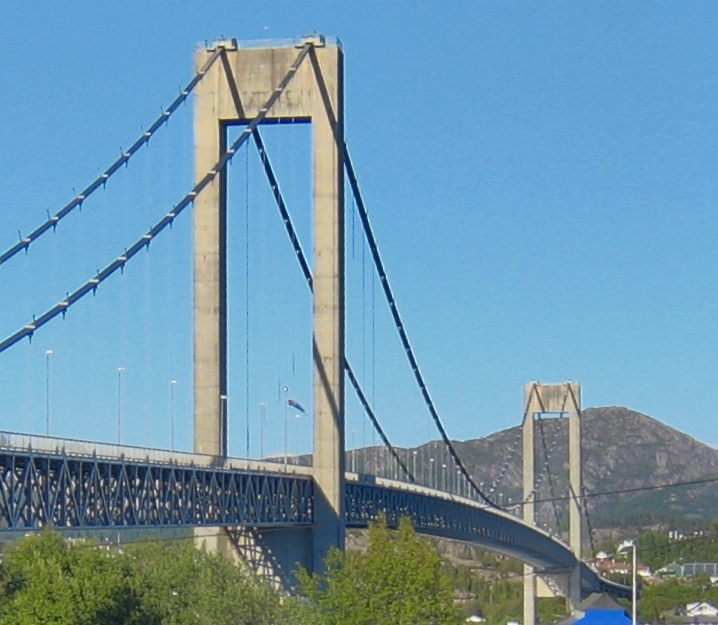 HDR Sotrabrua